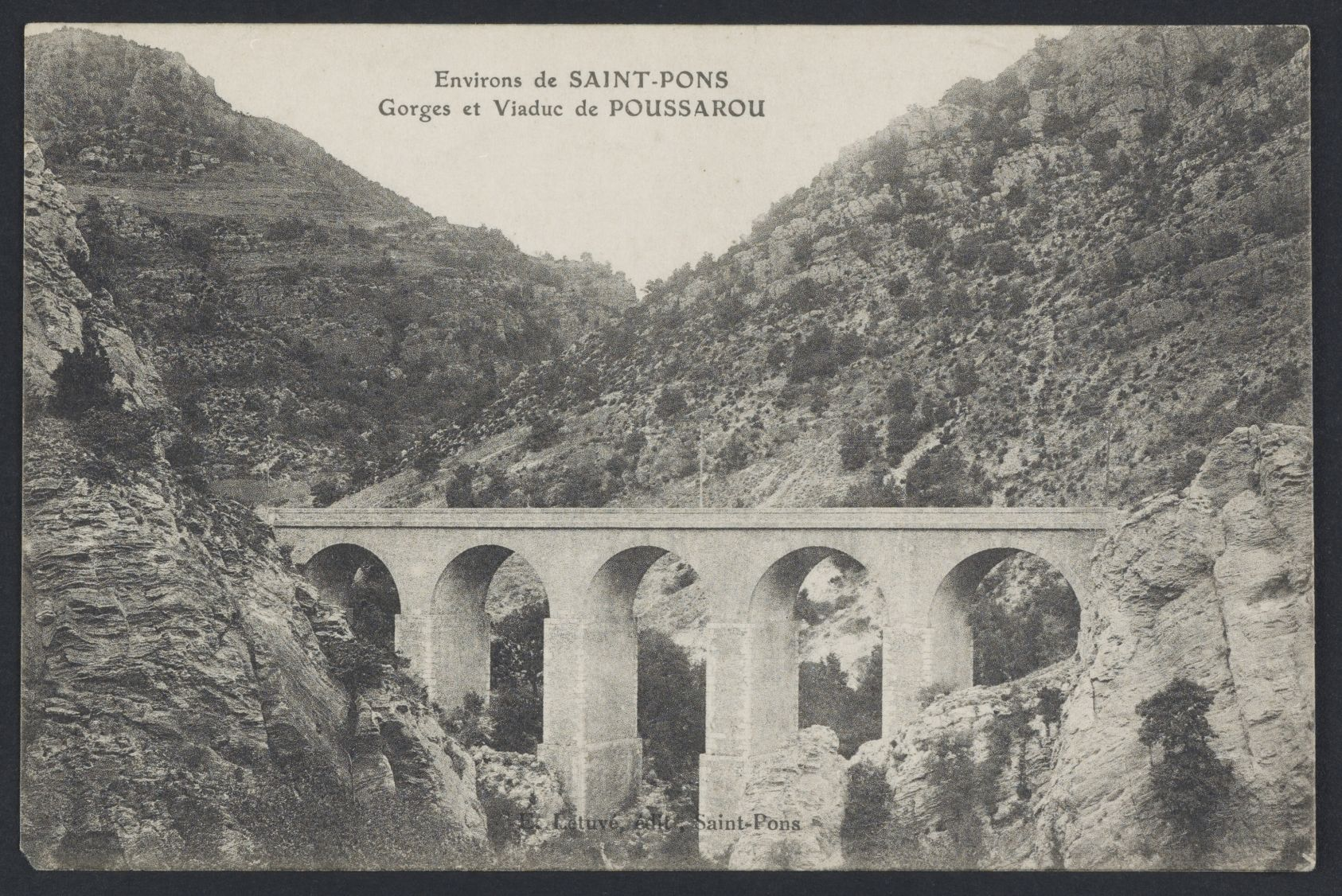 Ferrières-Poussarou. - Gorges et Viaduc de Poussarou : carte postale.